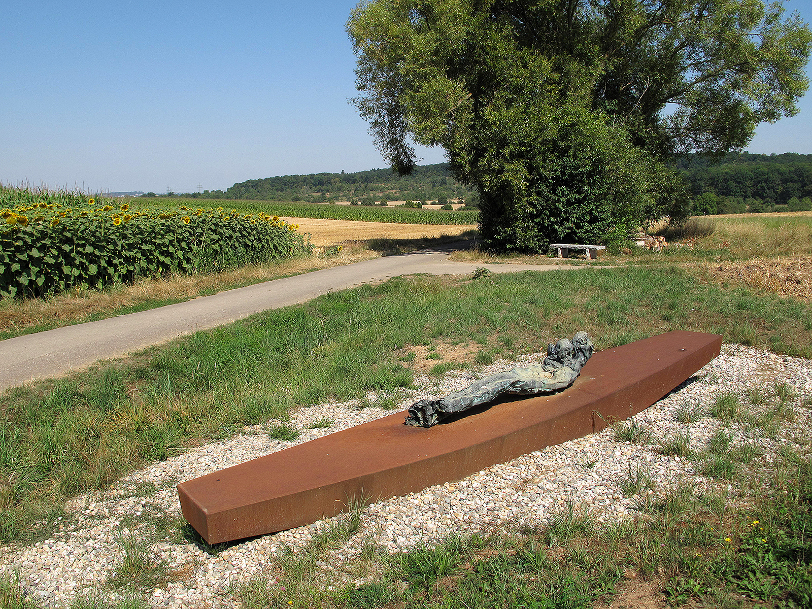 Jürgen Brodwolf, Geborgenheit/Vertrauen, 2004 – Baden-Württemberg, Rems-Murr-Kreis, Fellbach